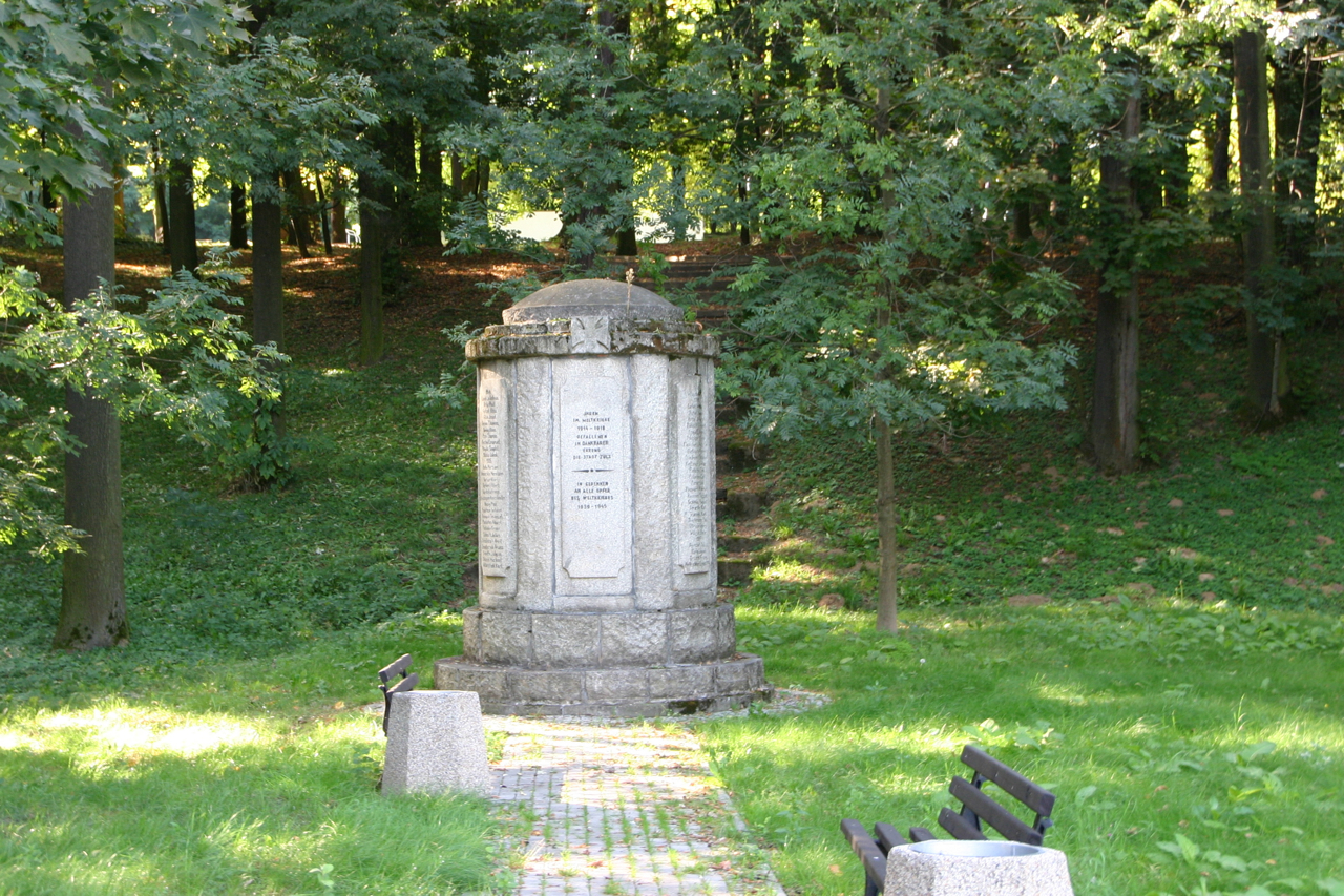 Biała (dodatkowa nazwa w j. niem. Zülz) – to miasto w woj. opolskim, w powiecie prudnickim.